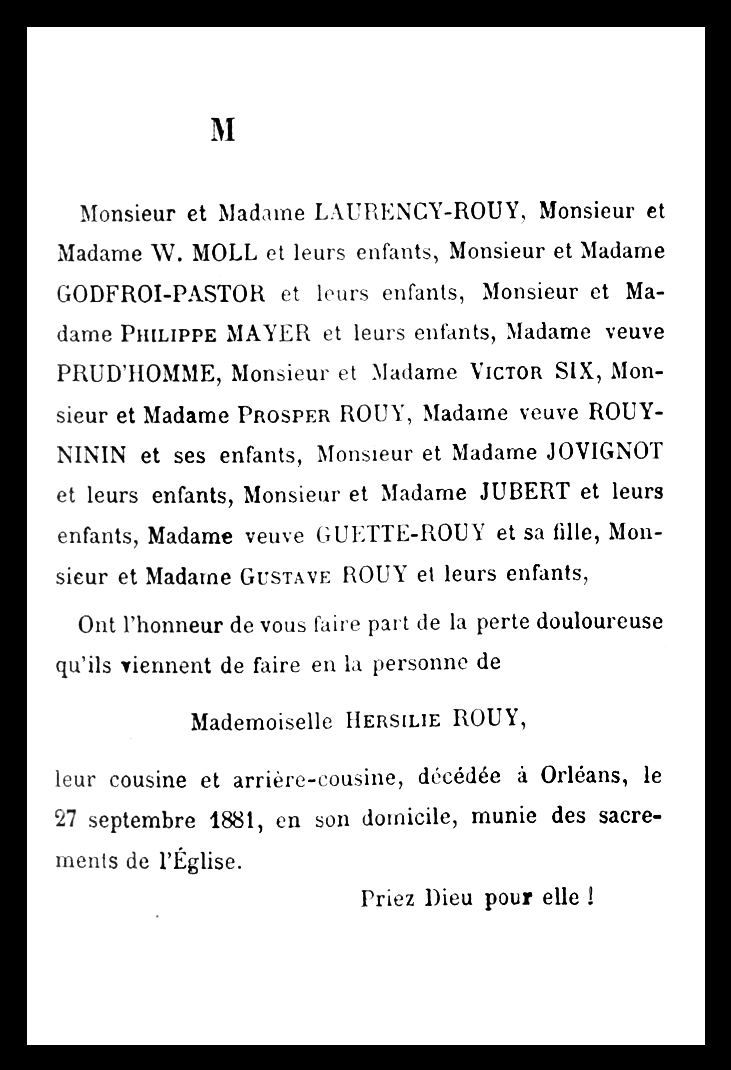 Faire-part de décès d'Hersilie Rouy 1881